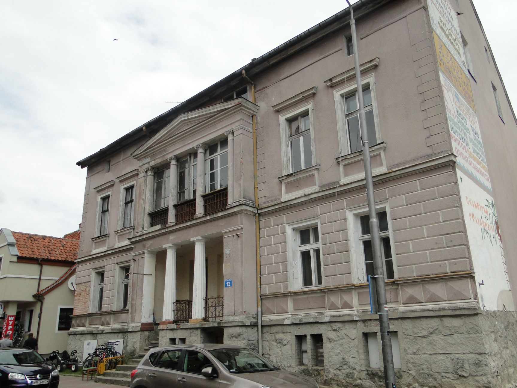 Ulica 3 Maja 12 w Mikołajkach